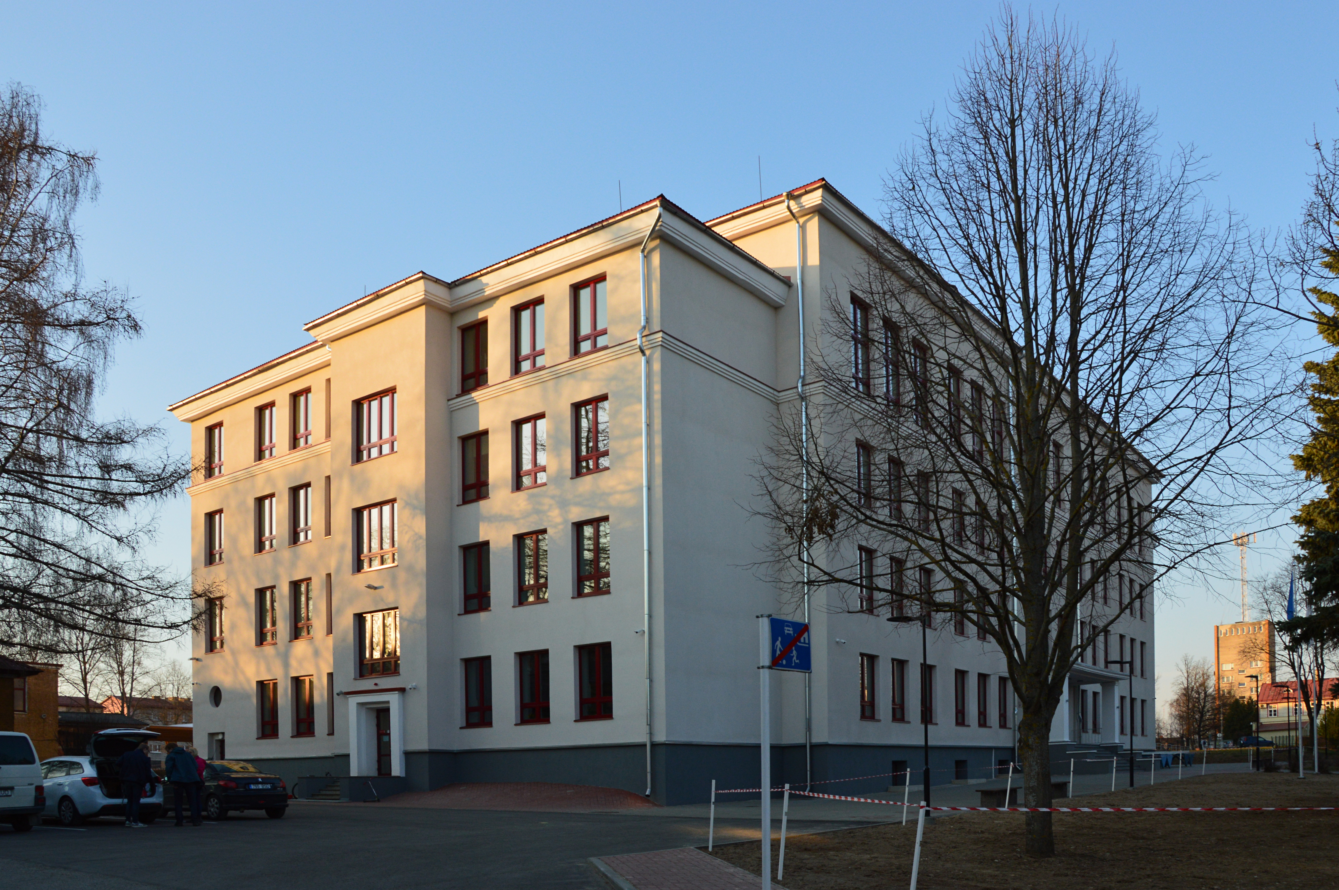 Võru Kesklinna Kool